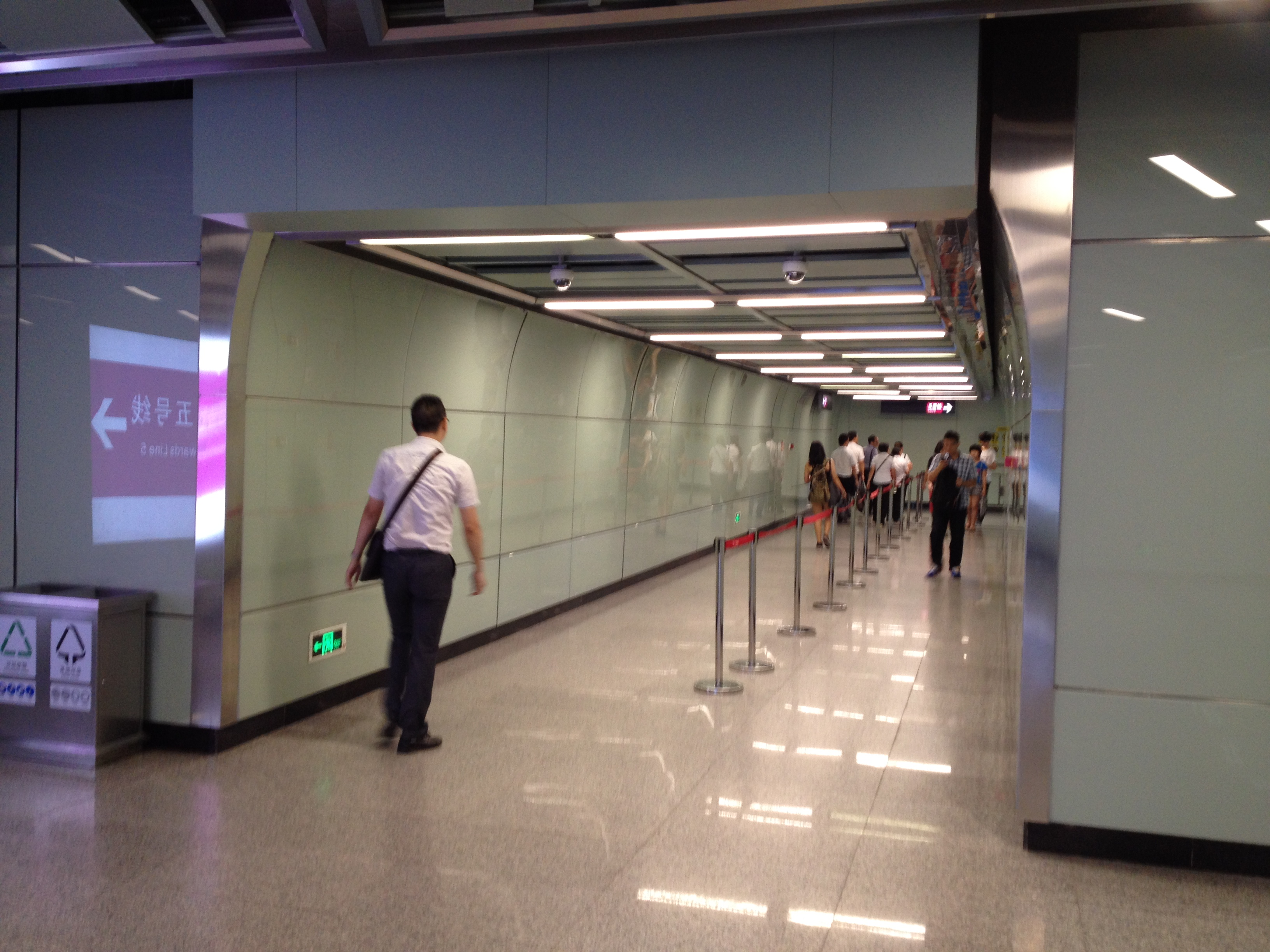 广州地铁区庄站换乘通道